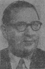 Arkitekten Karl Sörensen